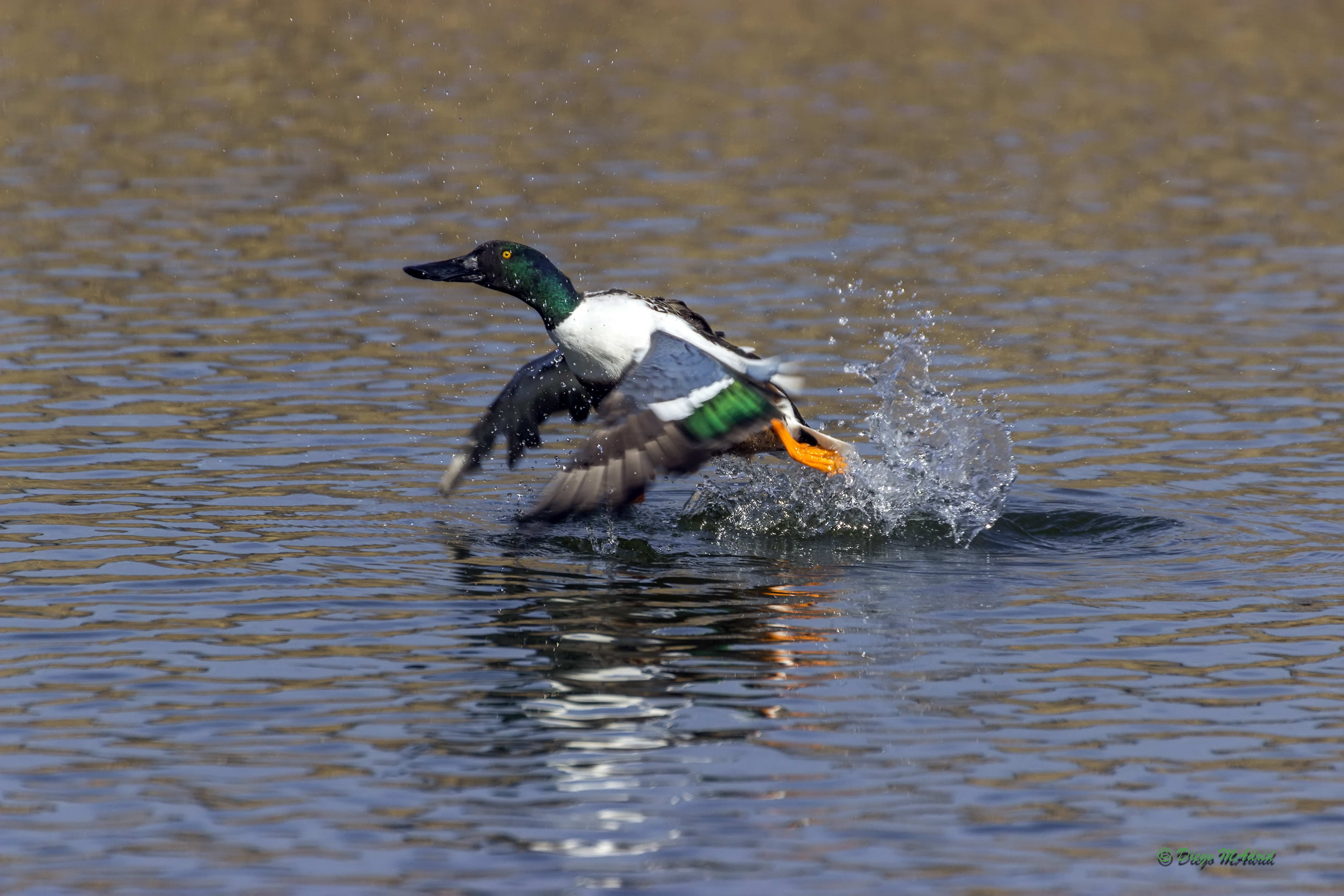 Pato Cuchara en las Tablas de Daimiel This is a photography of a Special Area of Conservation in Spain with the ID: ES0000013. Natura2000 entry, EEA entry